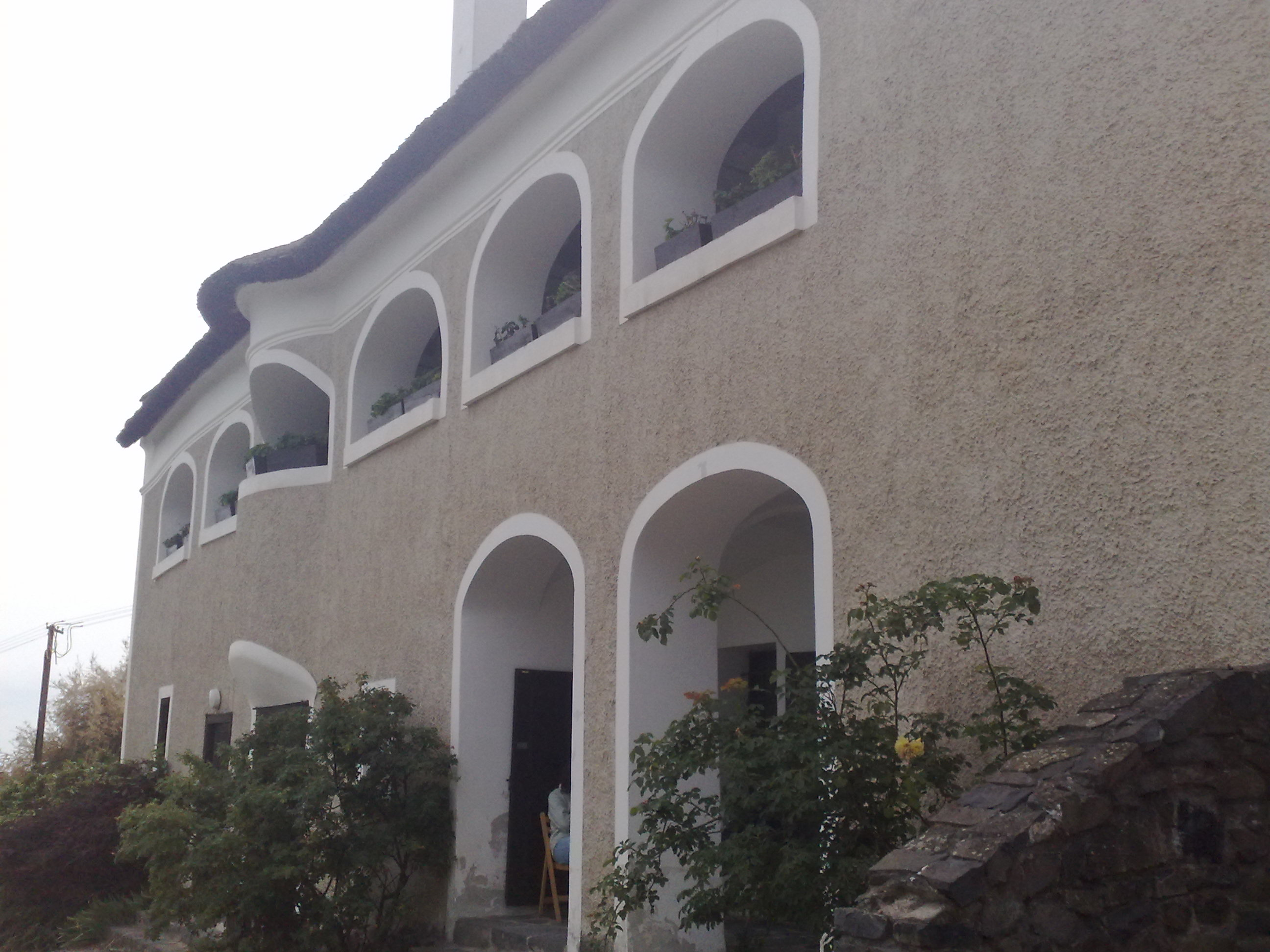 Szegedy Róza háza, udvarán présház és vincellérház. - Badacsony Kisfaludy u. 17 This is a photo of a monument in Hungary, Identifier: 9599